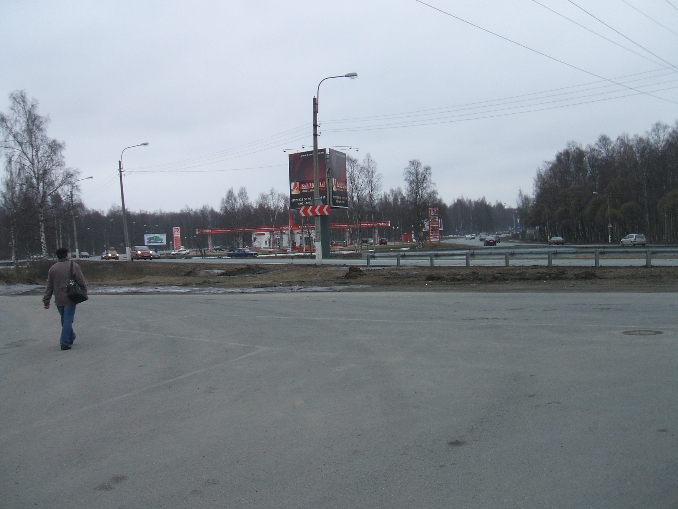 фотографии вдоль границ муниципального образования пос. Белоостров